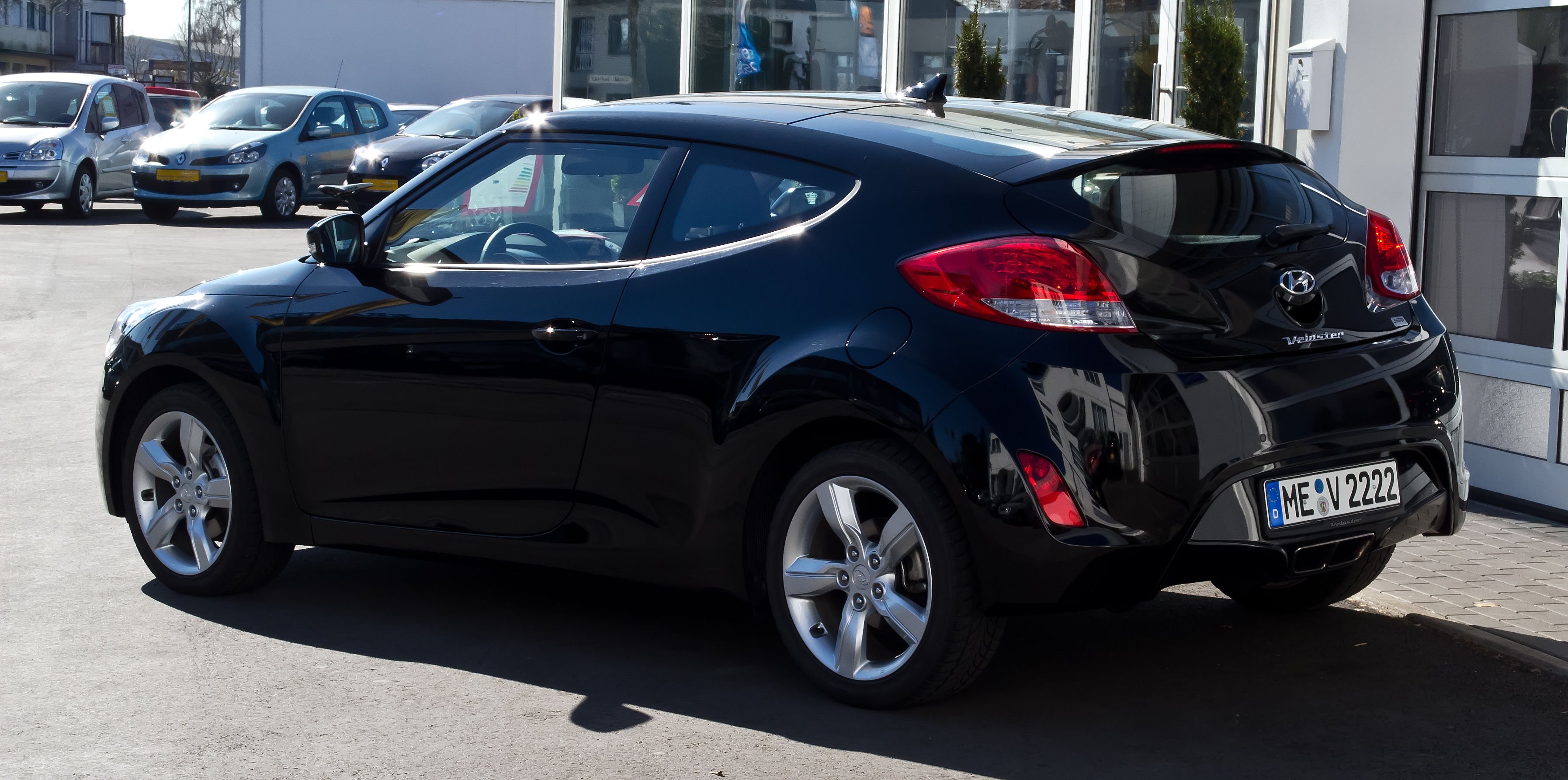 Hyundai Veloster 1.6 GDI Style